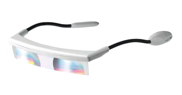 Lunettes de luminothérapie